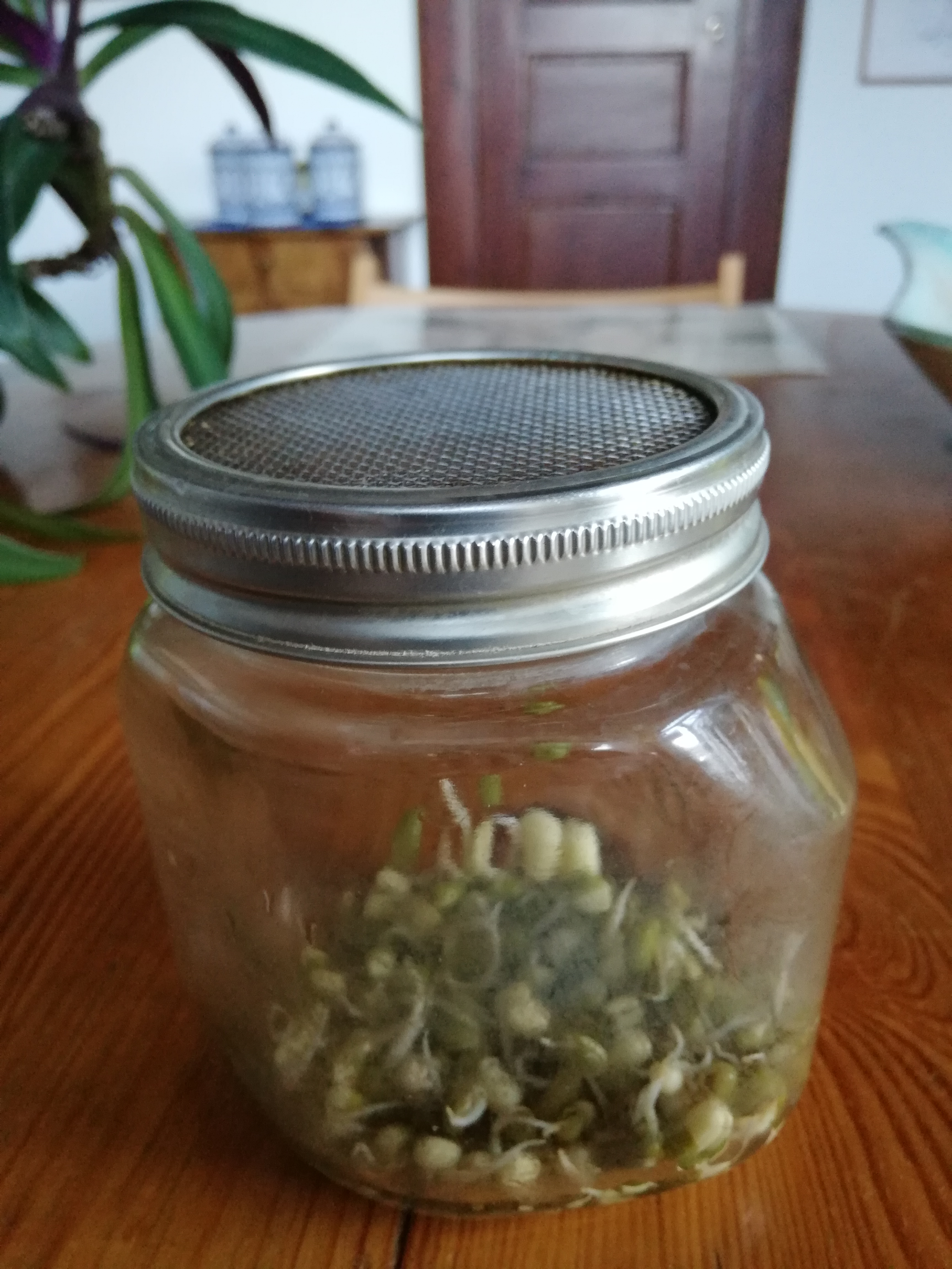 Tiu ujo havas apartan kovrilon: kribrilo